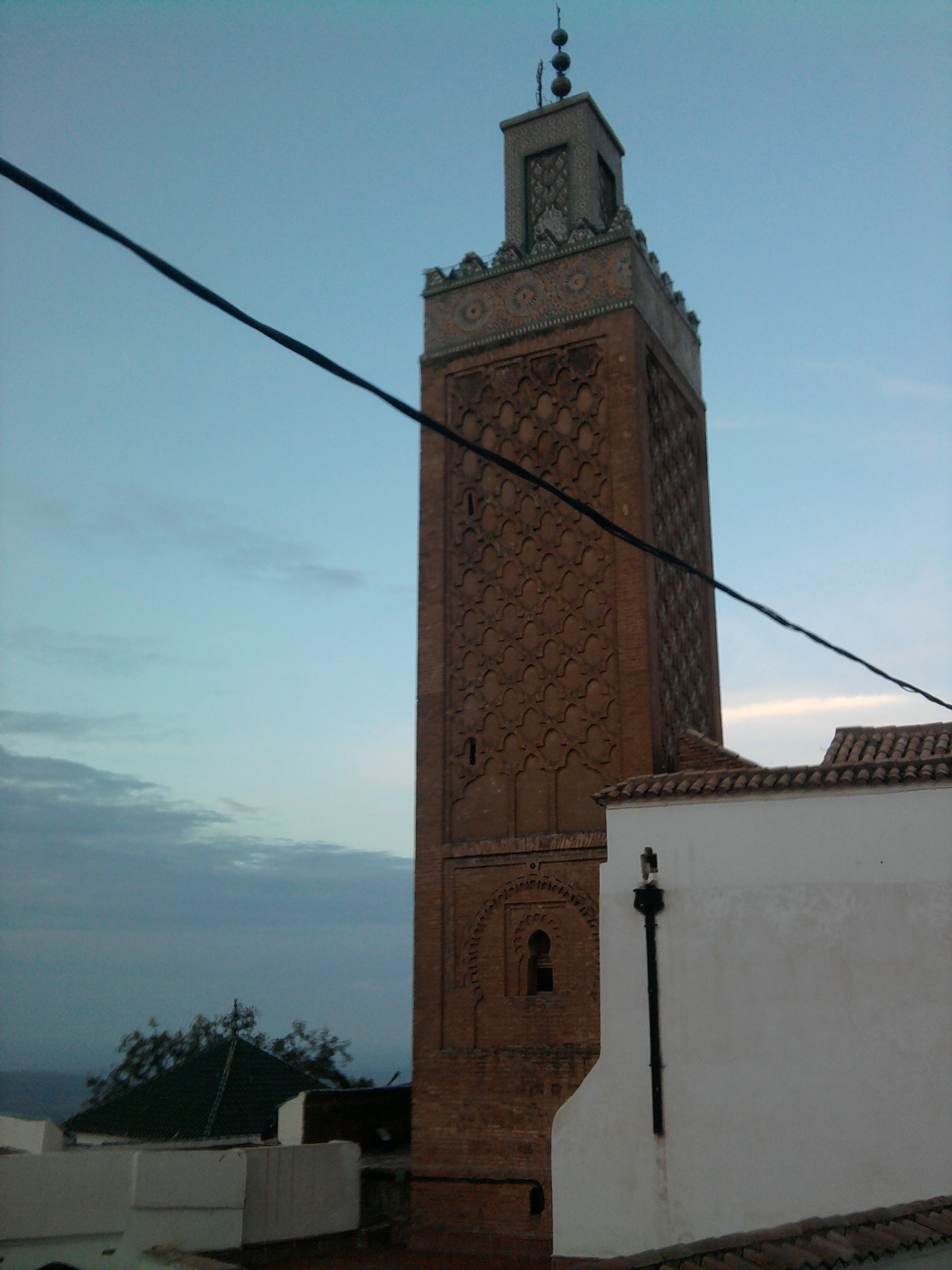 Mosquée de Sidi Boumediène et dépendances : Medersas.